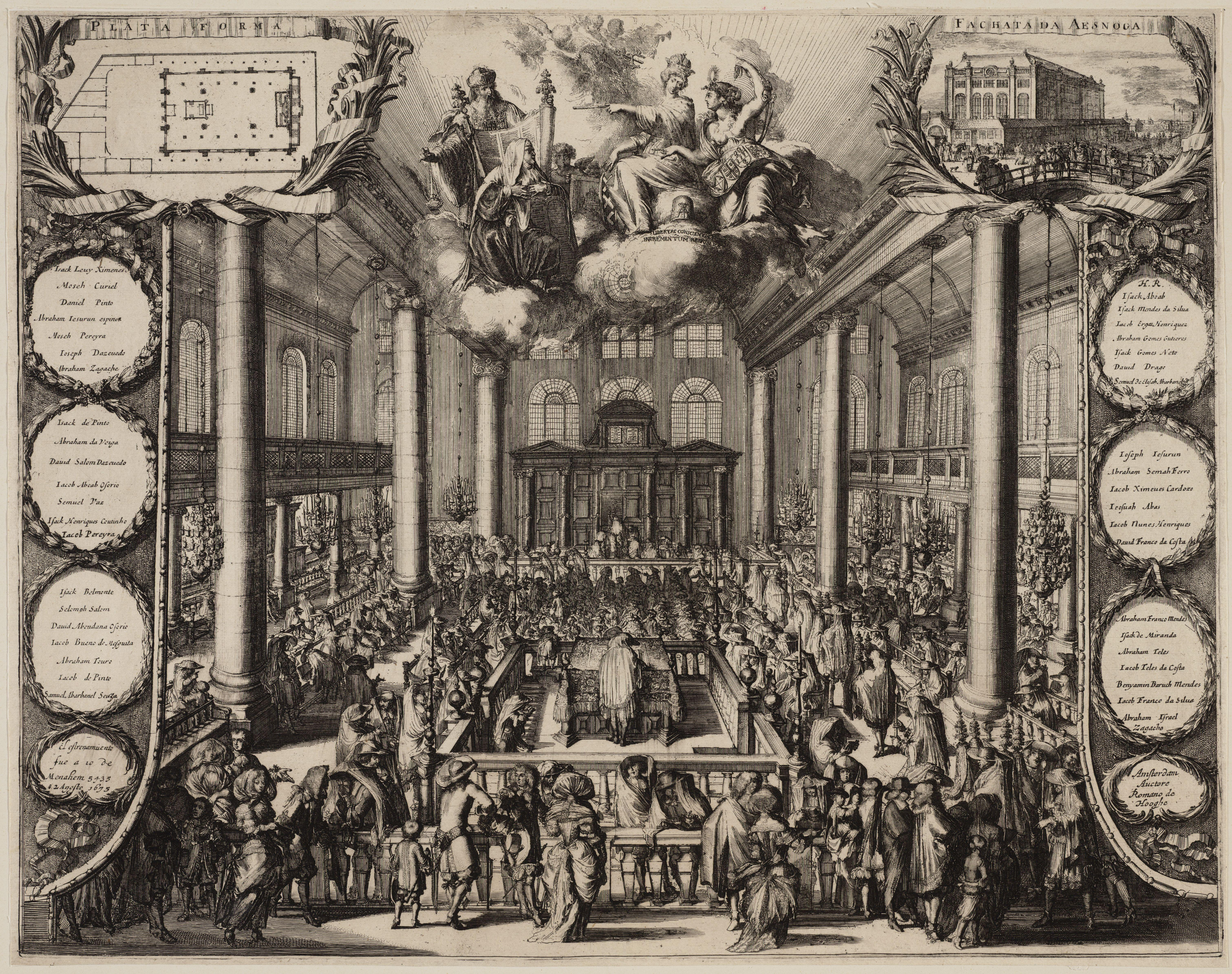 Beschrijving Den Tempel der Jooden tot Amsterdam Zeer zeldzame prent, uitgegeven bij de inwijding der Portugees-Israëlitische Synagoge, 2 augustus 1675, 10 Menahem 5435; met Hollandse, Spaanse, Hebreeuwse, Latijnse en Franse verzen. Hoofdvoorstelling van de prent betreft het interieur van de synagoge. Links boven een plattegrond, rechts boven een vooraanzicht. Midden boven allegorische figuren met onder meer de Amsterdamse stedemaagd en personificaties van het Joodse geloof. Documenttype prent Vervaardiger Hooghe, Romeyn de Collectie Collectie Atlas Dreesmann Datering 2 augustus 1675 Geografische naam Mr. Visserplein Inventarissen Afbeeldingsbestand 010094005221